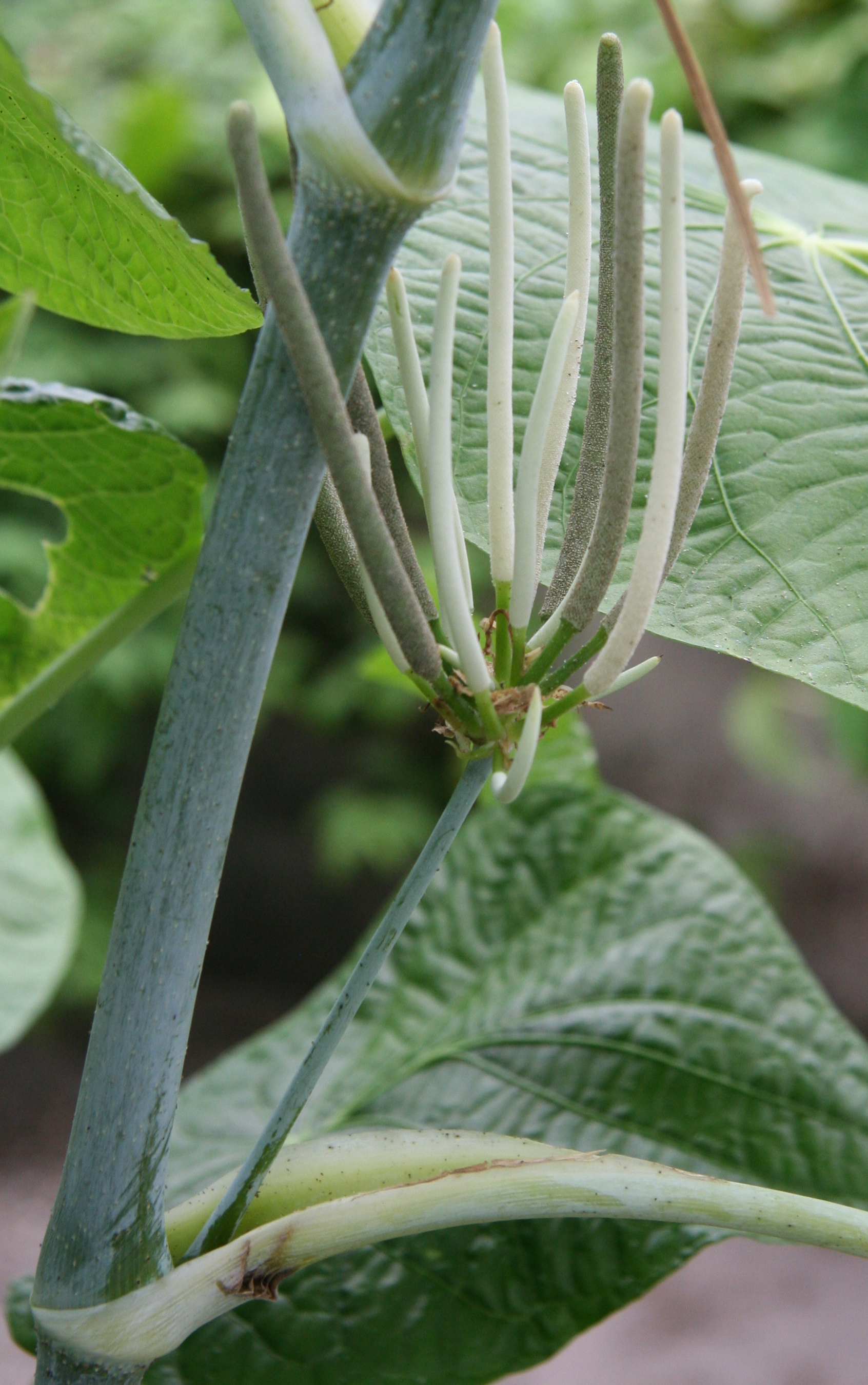 Piper peltatum im Botanischen Garten Dresden